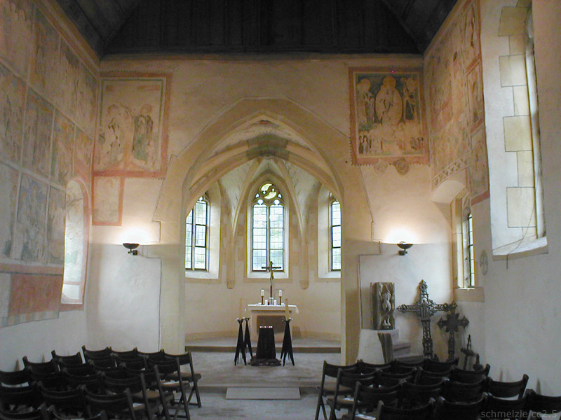 Blick zum östlichen Chor der Gutleutkapelle in Mosbach